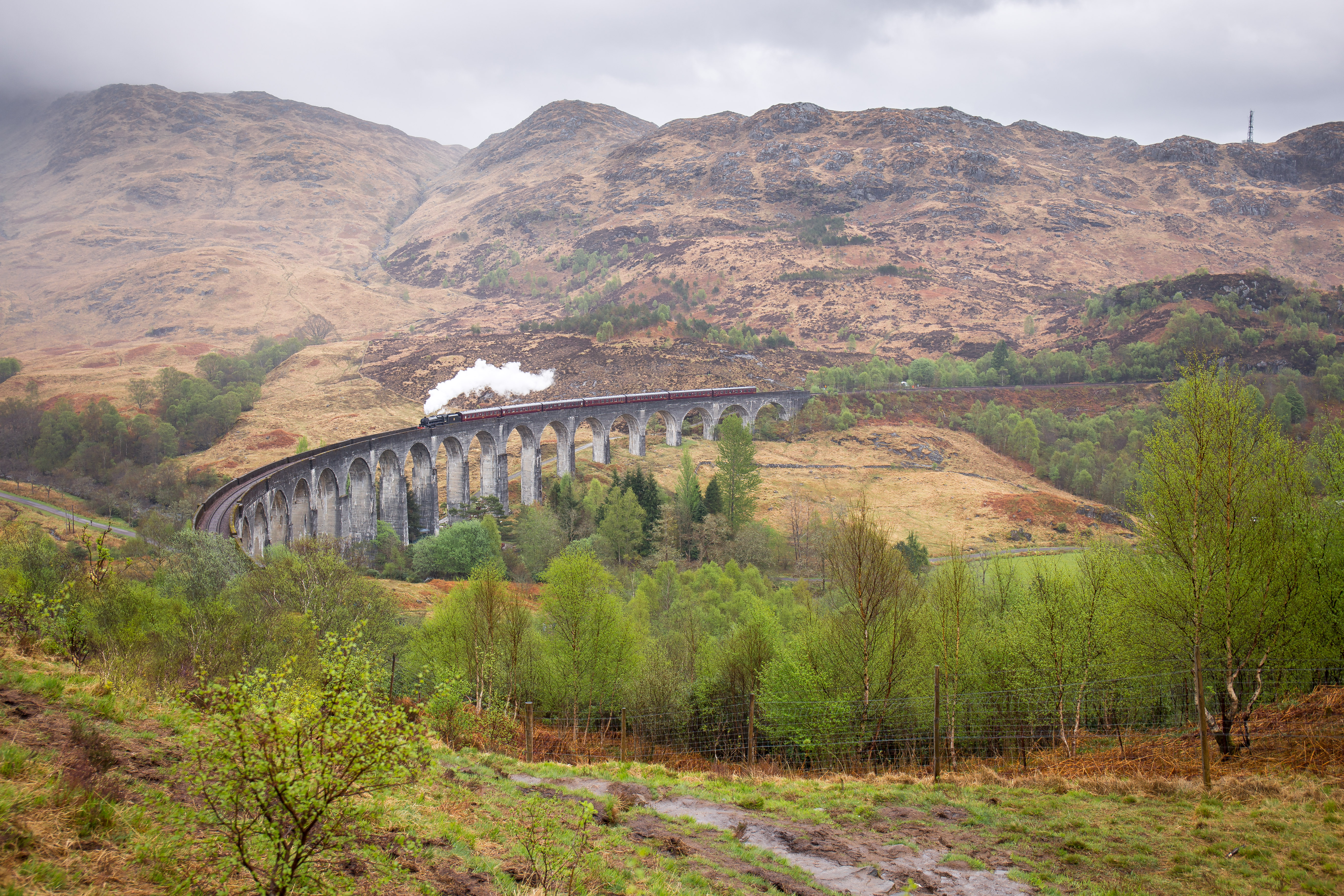 Viaduc de Glenfinnan, train à vapeur. Lieu de tournage des films Harry Potter.